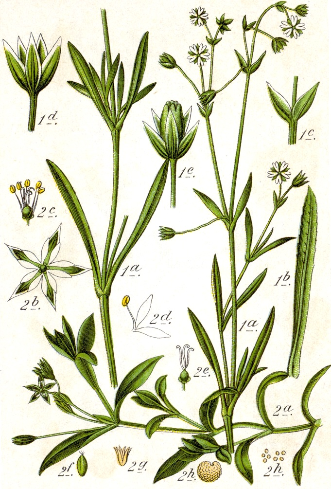 1. Stellaria longifolia Muhl. ex Willd., Alsine friesiana (Ser.) E.H.L.Krause 2. Stellaria uliginosa Murray, syn. Stellaria alsine Grimm, nom. inv., Alsine uliginosa (Murray) E.H.L.Krause Original Caption 1. Fries-Miere, Alsine friesiana 2. Sumpf-Miere, Alsine uliginosa